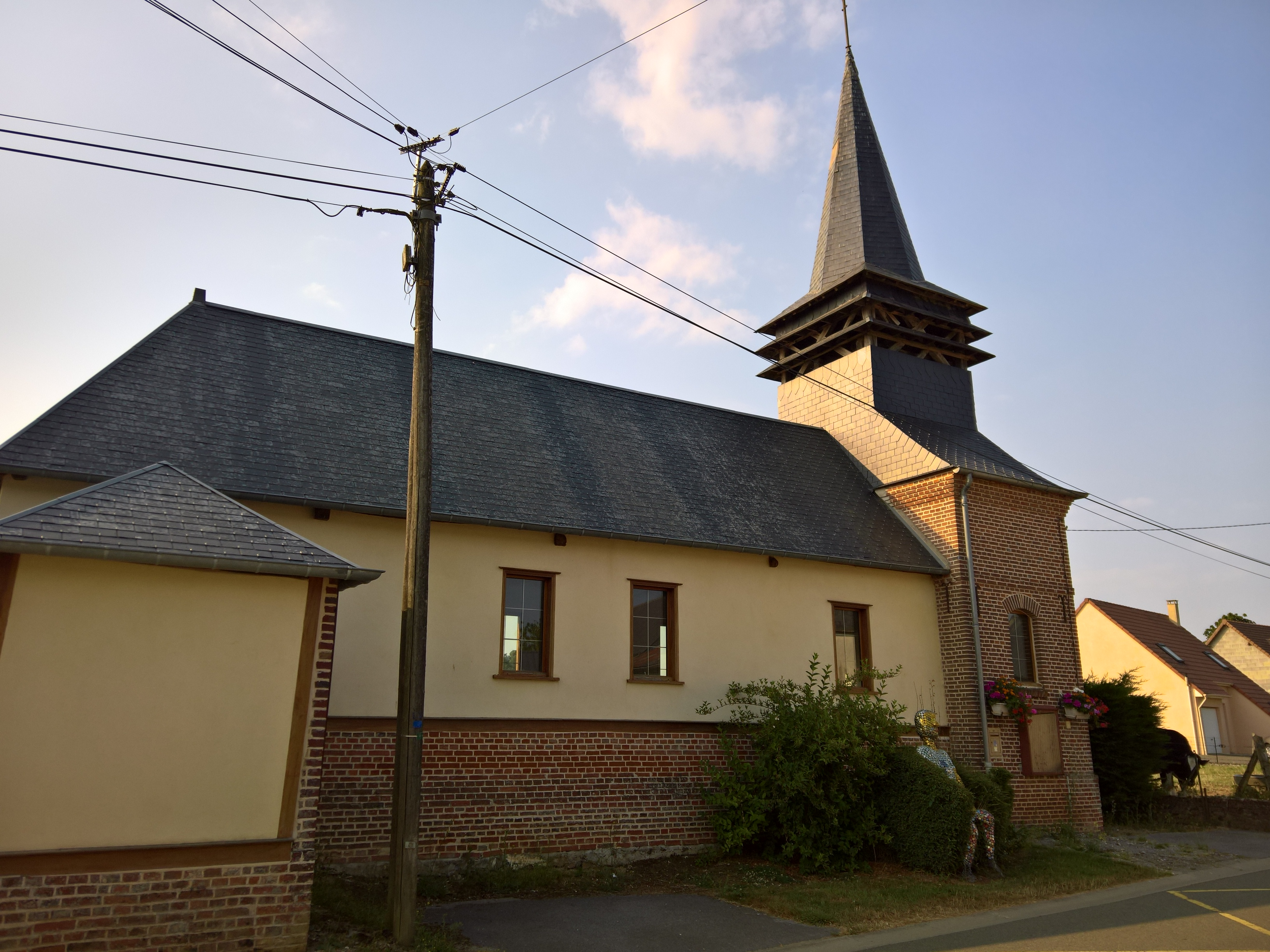 Réderie (hameau de Dargies - Oise) - Façade nord de la chapelle